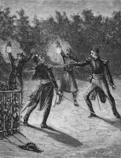 "Duel de Saint-Arnauld [sic] et Cornemuse".